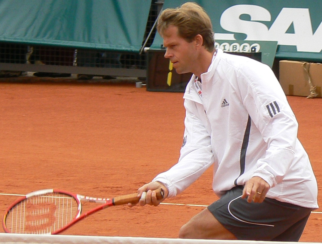 english: Stefan Edberg (taken by Michael Erhardsson, Sweden) playing in Båstad, Sweden (July, 2007) * german: Stefan Edberg (fotografiert von Michael Erhardsson, Schweden) in Båstad, Schweden (Juli 2007)